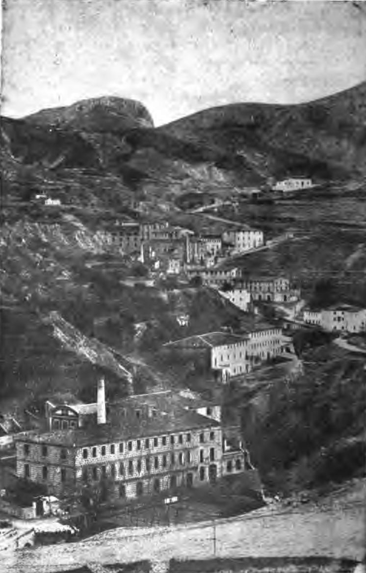 Alcoy: Ría del Molinas y fábricas